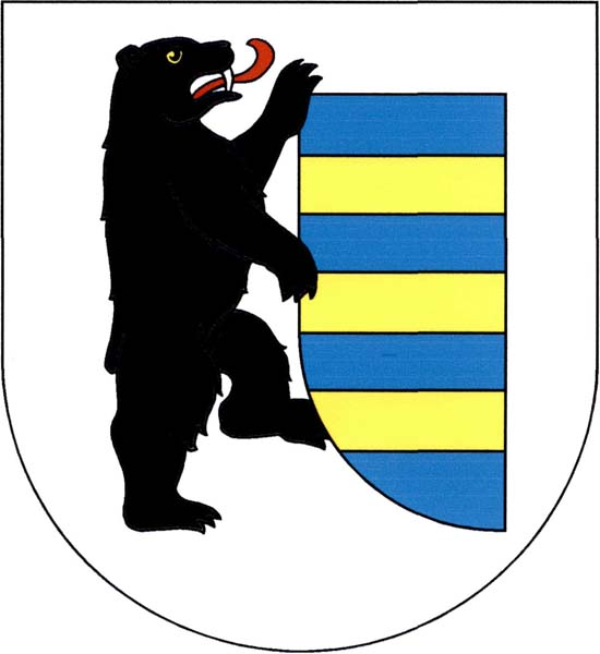 Znak obce Horní Pěna